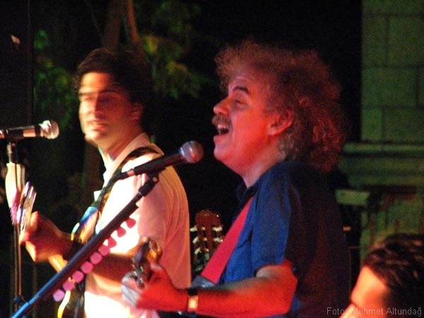 Bu fotoğraf tarafımca 19 Temmuz 2007 Perşembe günü, saat 21:45'de Beşiktaş/Abbasağa Parkında çekilmiştir.